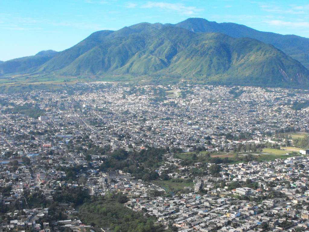 El ahora llamado cerro de San Juan,en Tepic Nayarit México, se compone de una formación volcánica donde su punto más alto está a 2,240 metros sobre el nivel del mar y se puede apreciar.